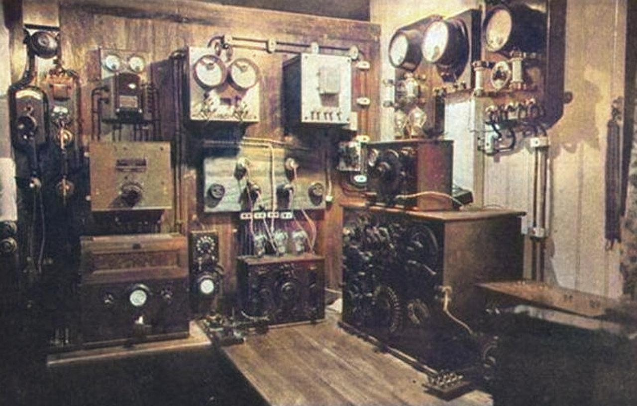 station radiotélégraphique du paquebot Paris vers 1922